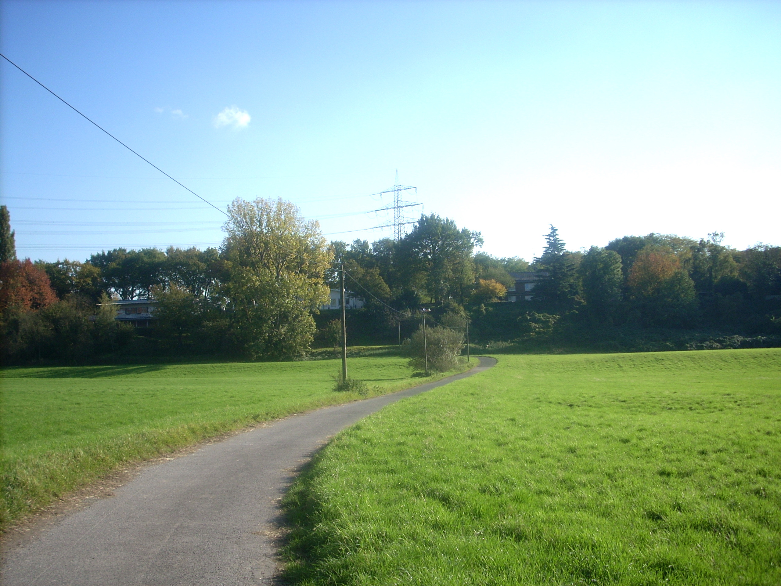 Blick auf den Duisburger Ortsteil Ehingen von Westen